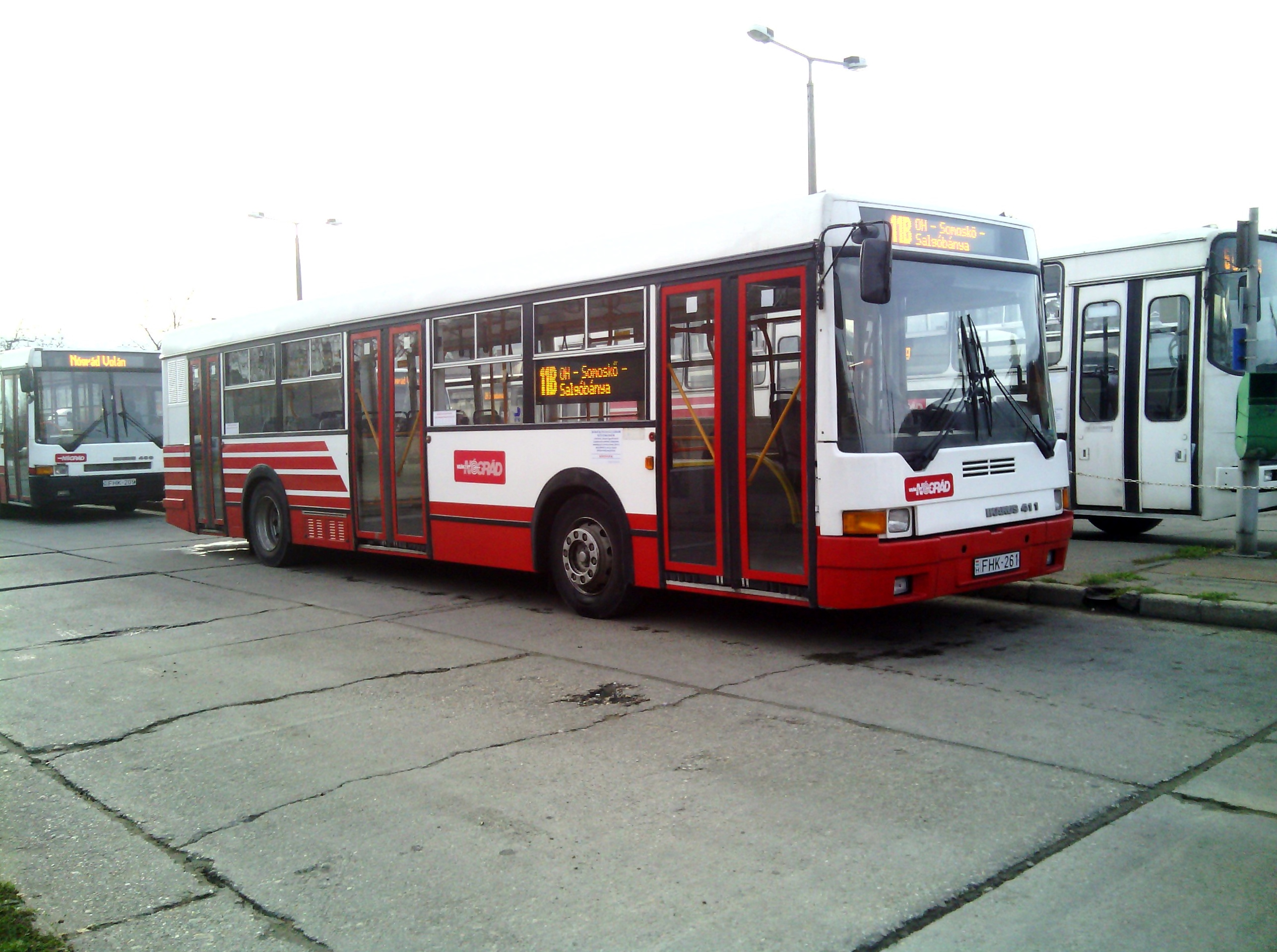 11B busz Salgótarján Helyi buszállomáson